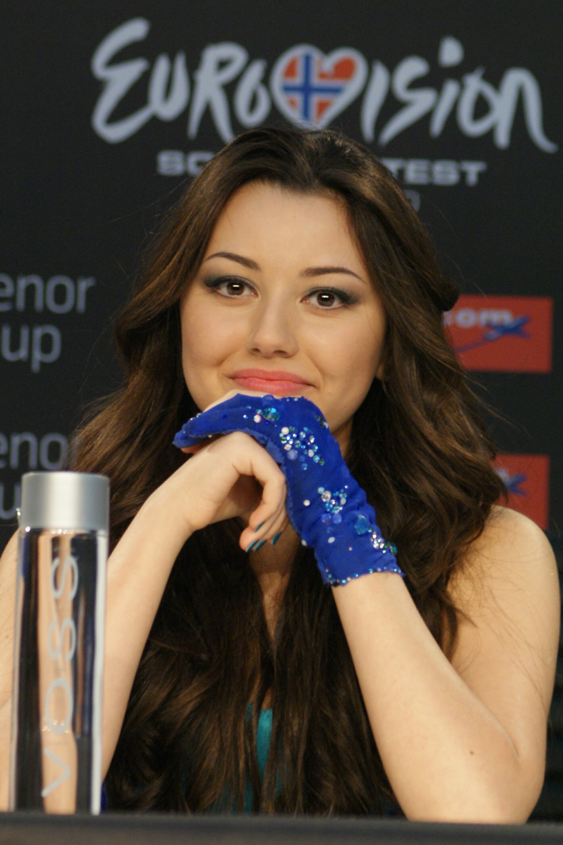 La cantante azerí Safura en Oslo, en el Festival de Eurovisión 2010.